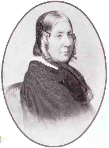 Maria Ludovica Katharina Brentano von La Roche verh.II.Ehe mit Richard Peter von Rosier des Bordes * 10. Januar 1787 in Frankfurt am Main † 19. November 1854 in Würzburg, Schwester des Dichter Clemens Brentano, Wasserlos